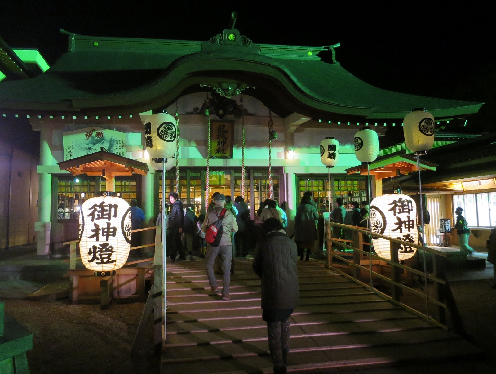 龍城神社（岡崎市康生町）